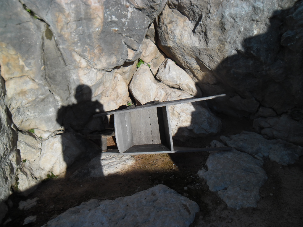 tačke u Sokol-gradu u Konavlima